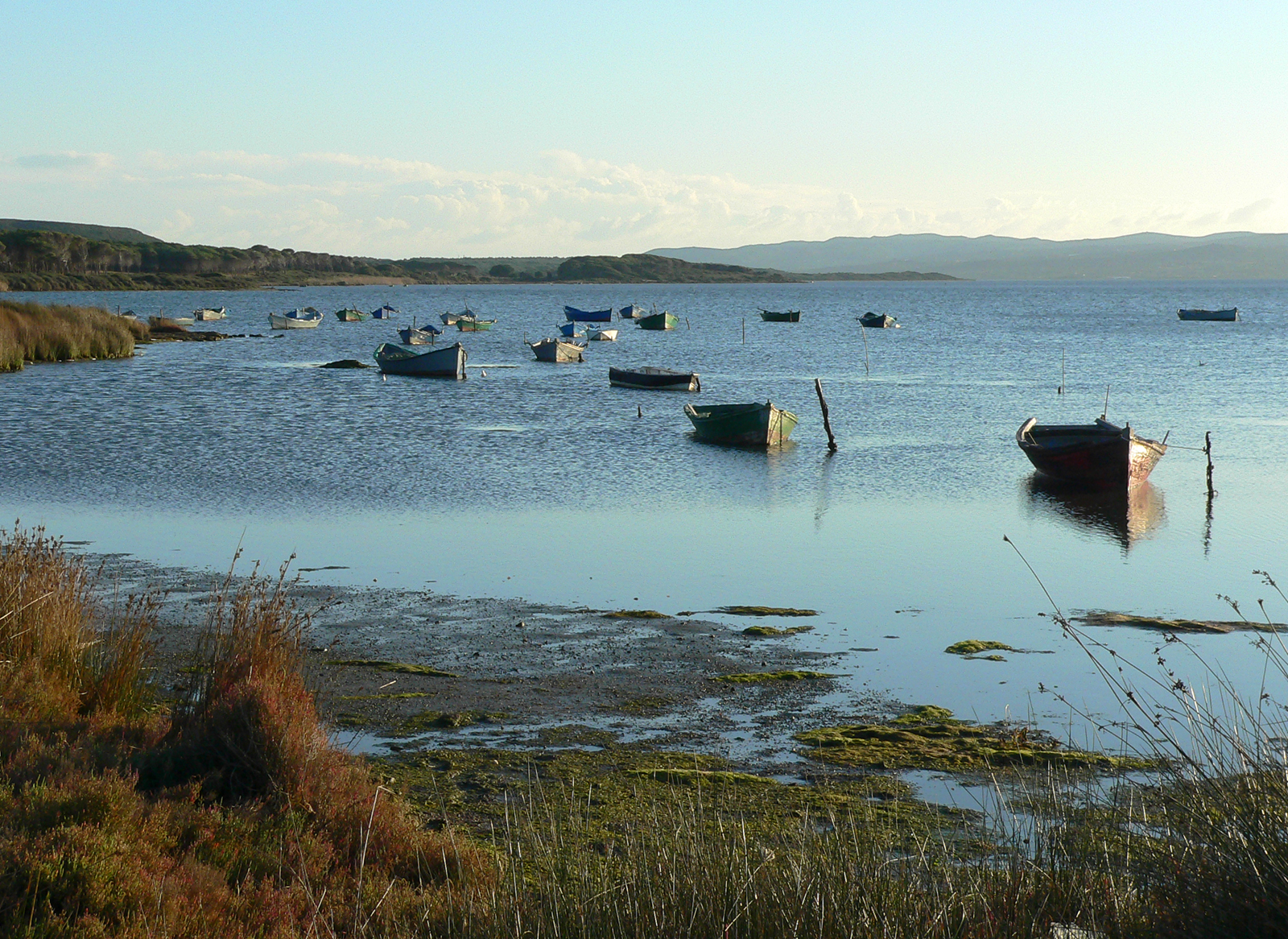 San Giovanni Suergiu - Bruncu Teula. Barche nella laguna sulcitana